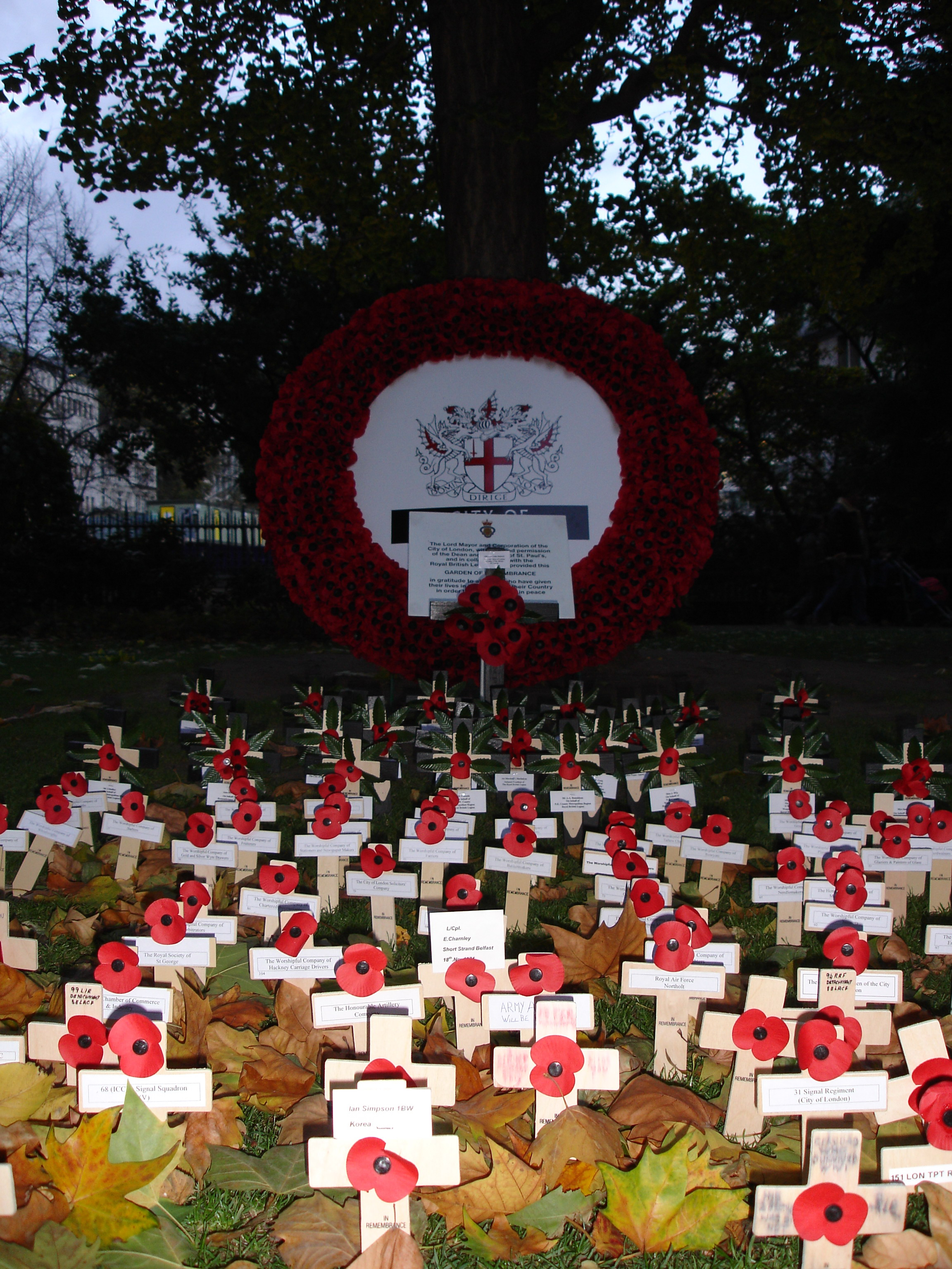 Poppy appeal